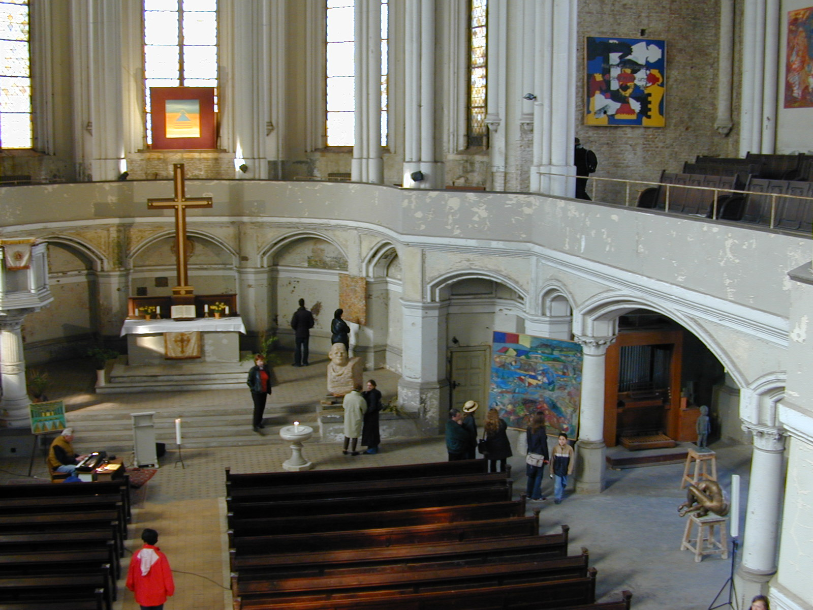 Ausstellung Licht in der Zionskirche 2002 in Berlin. zusehen sind die Bilder,Licht, Zeitsprung,Abendmahl sowie Bonhoeffer von A. Hrdlicka